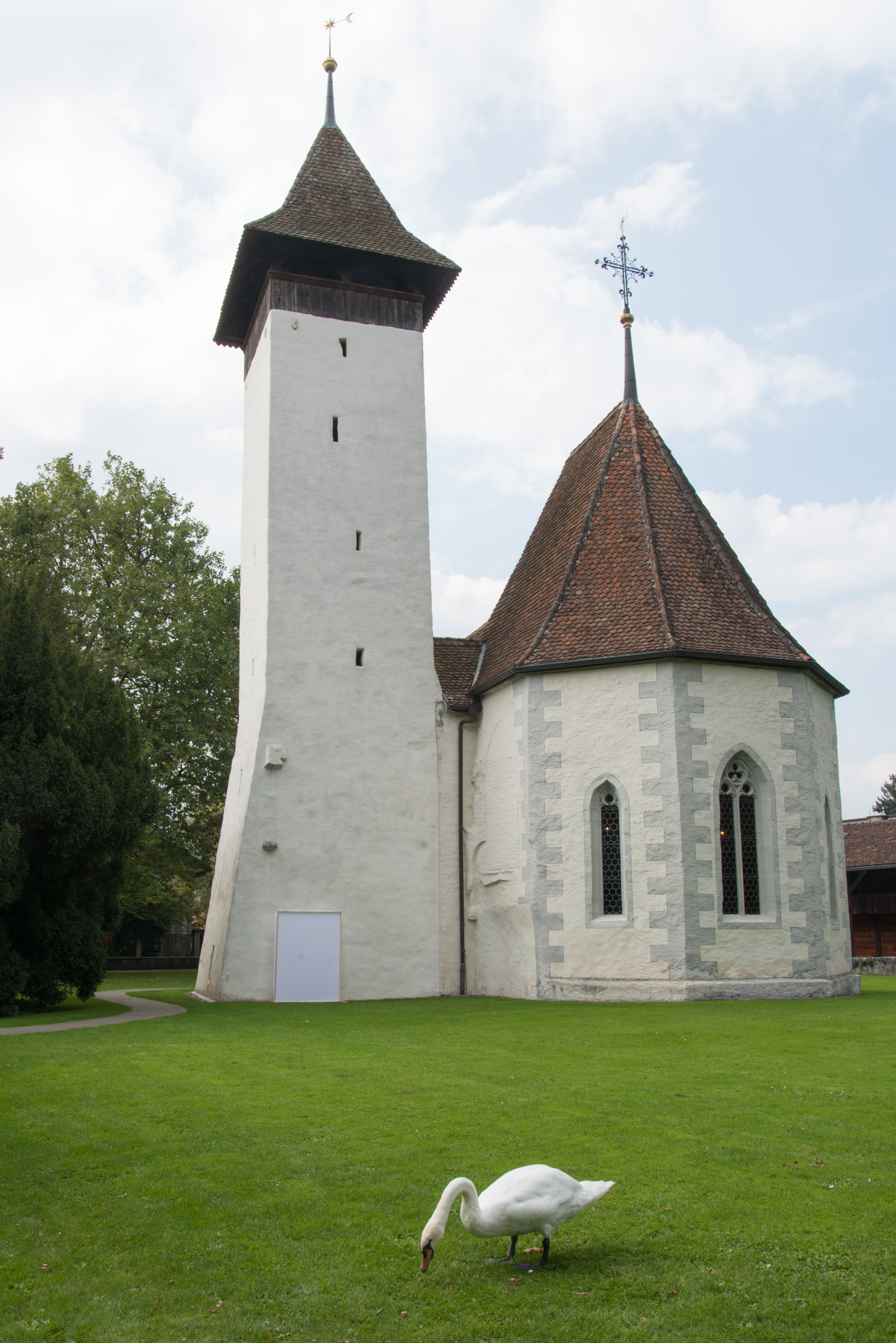 Reformierte Kirche Scherzligen, Seeseite